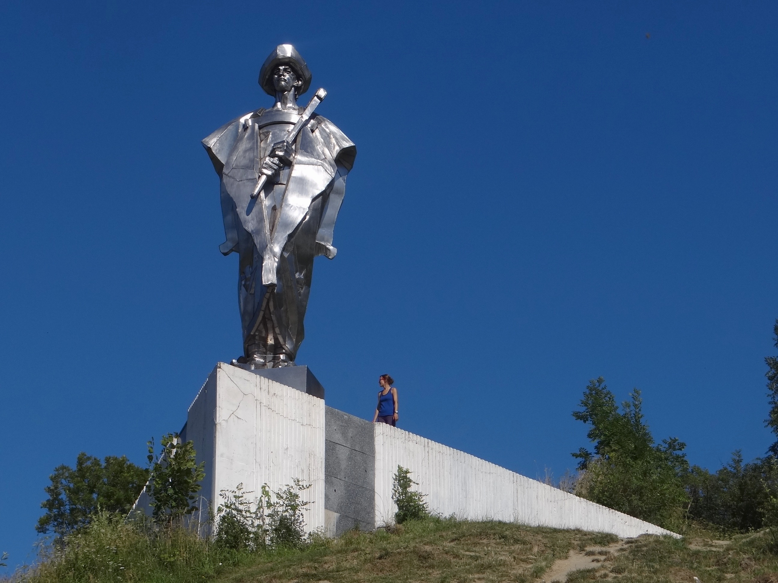 Statue of Juraj Jánošík in Terchová